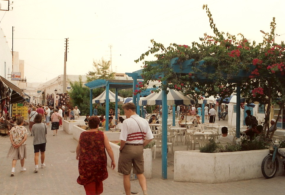 Café in Houmt Souk, Djerba, Tunisia